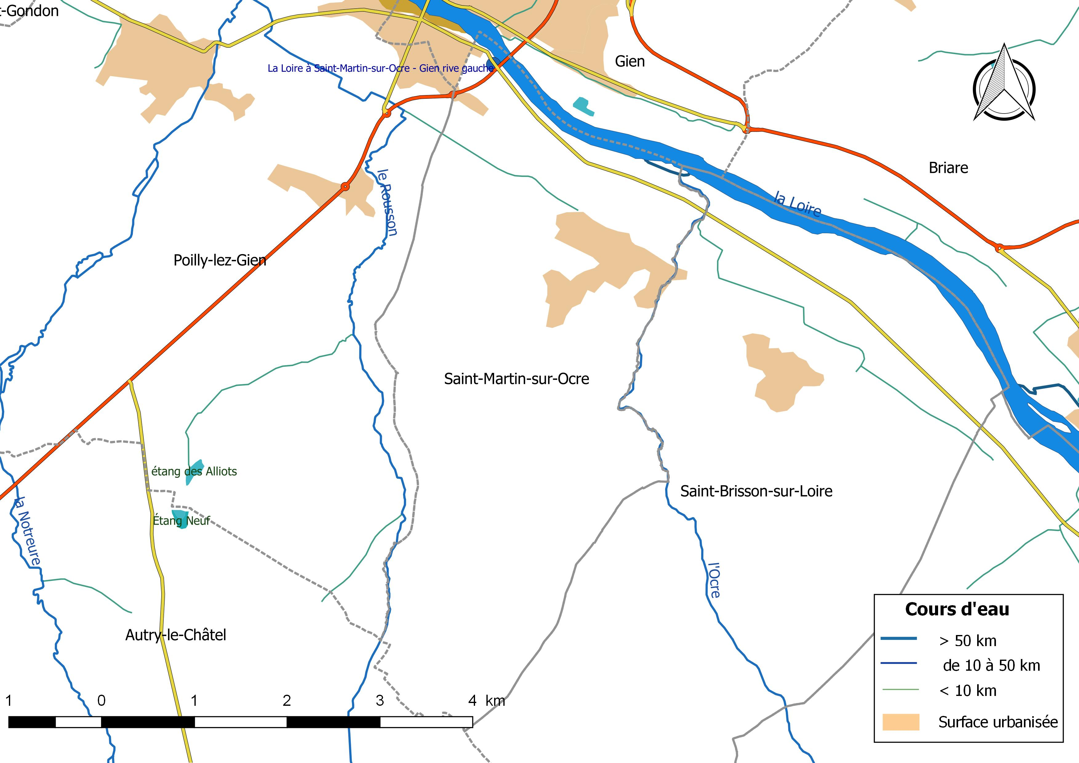 Carte du réseau hydrographique de la commune de Saint-Martin-sur-Ocre (Loiret) (France).